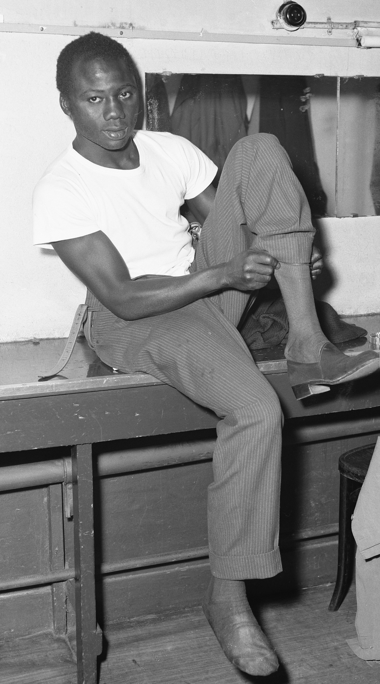 Bokser Idrissa Dione (Frankrijk)